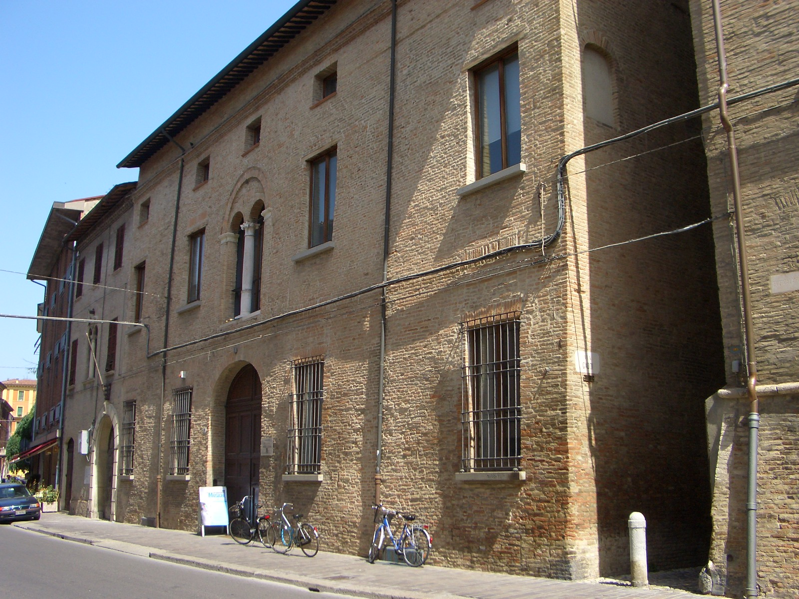 Palazzo Sangiorgi di Forlì, oggi sede del Liceo Musicale Masini